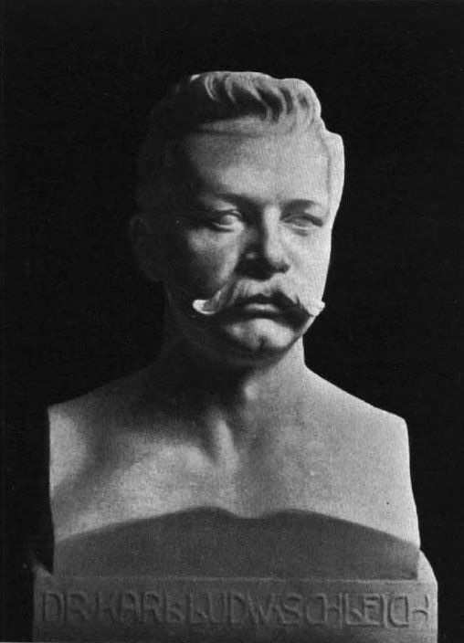 Büste von Karl Ludwig Schleich des Bildhauers Otto Stichling.